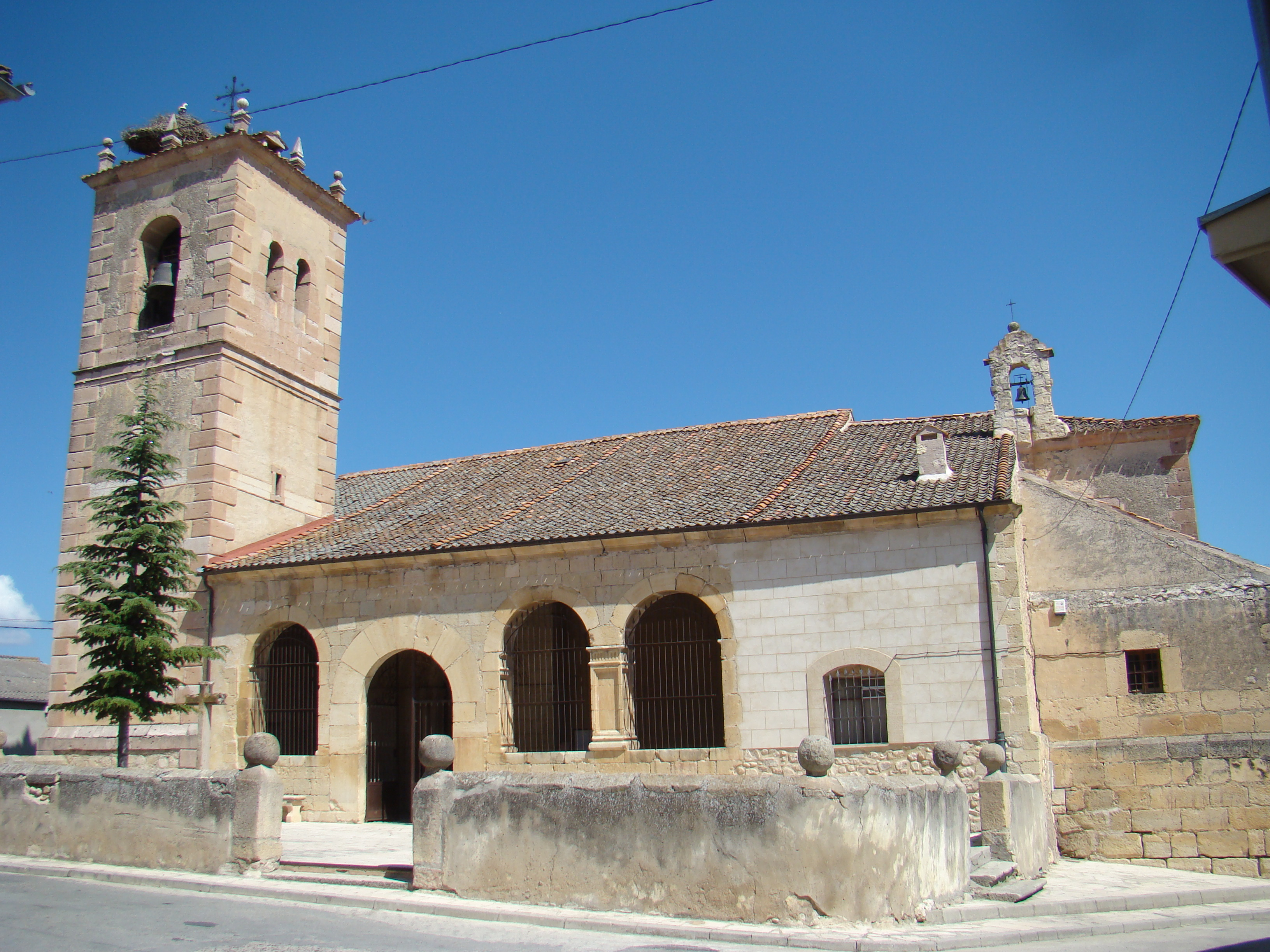 Muñoveros es un pueblo de España, en la provincia de Segovia, comunidad autónoma de Castilla y León. Iglesia parroquial de San Felix.